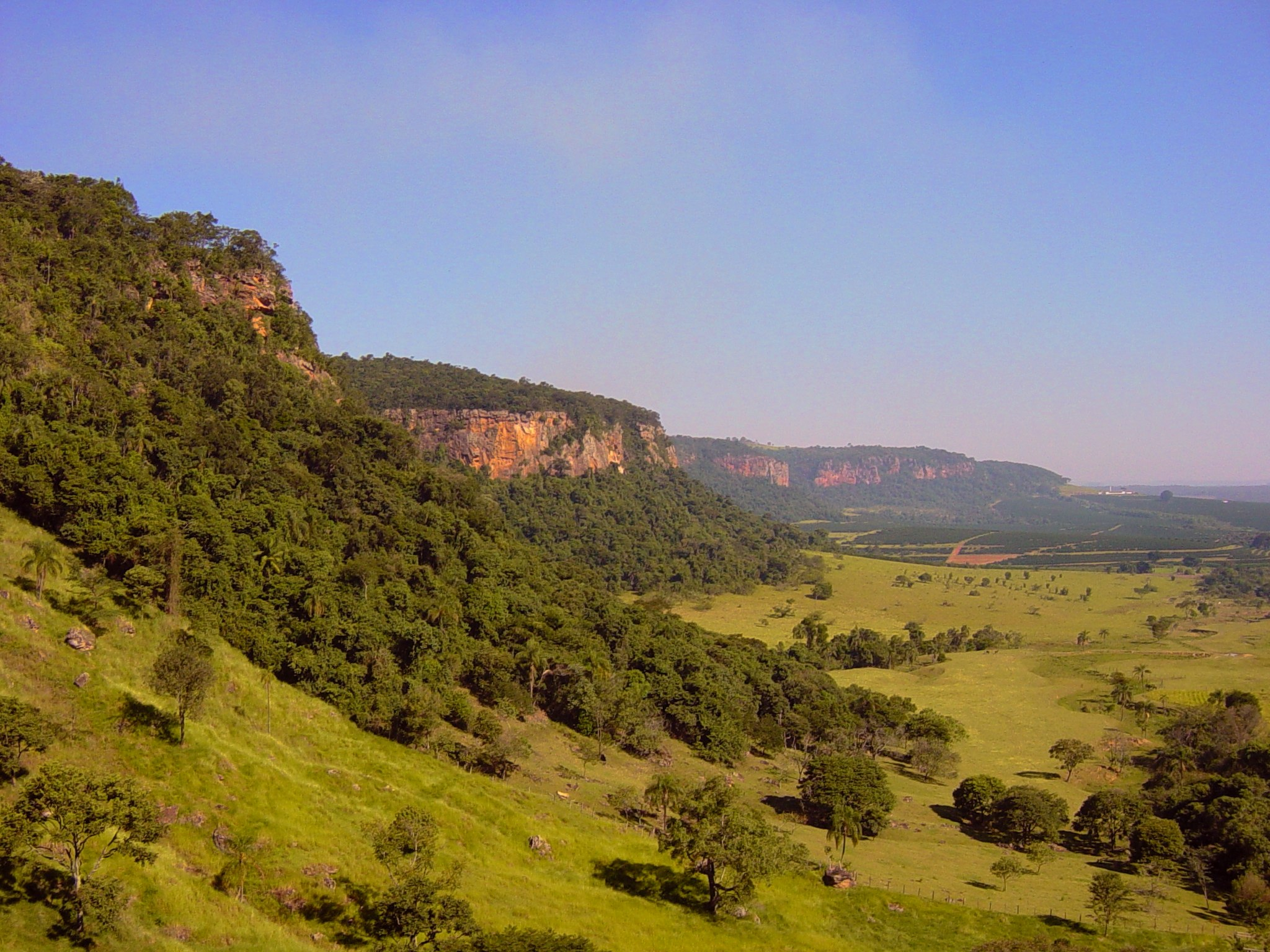 Sandstone cliffs. Analândia, Brazil